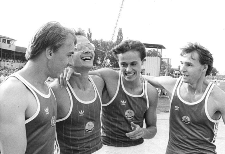 ADN-ZB Kluge 3.6.84 Erfurt: 35. DDR-Meisterschaften in der Leichtathletik - Europarekord - Eine 4x 400-m-Staffel der Männer mit Guido Lieske, Thomas Schönlebe, Jens Carlowitz und Mathias Schersing (vlnr) stellte in 3:00,07 Min einen neuen Europarekord auf.